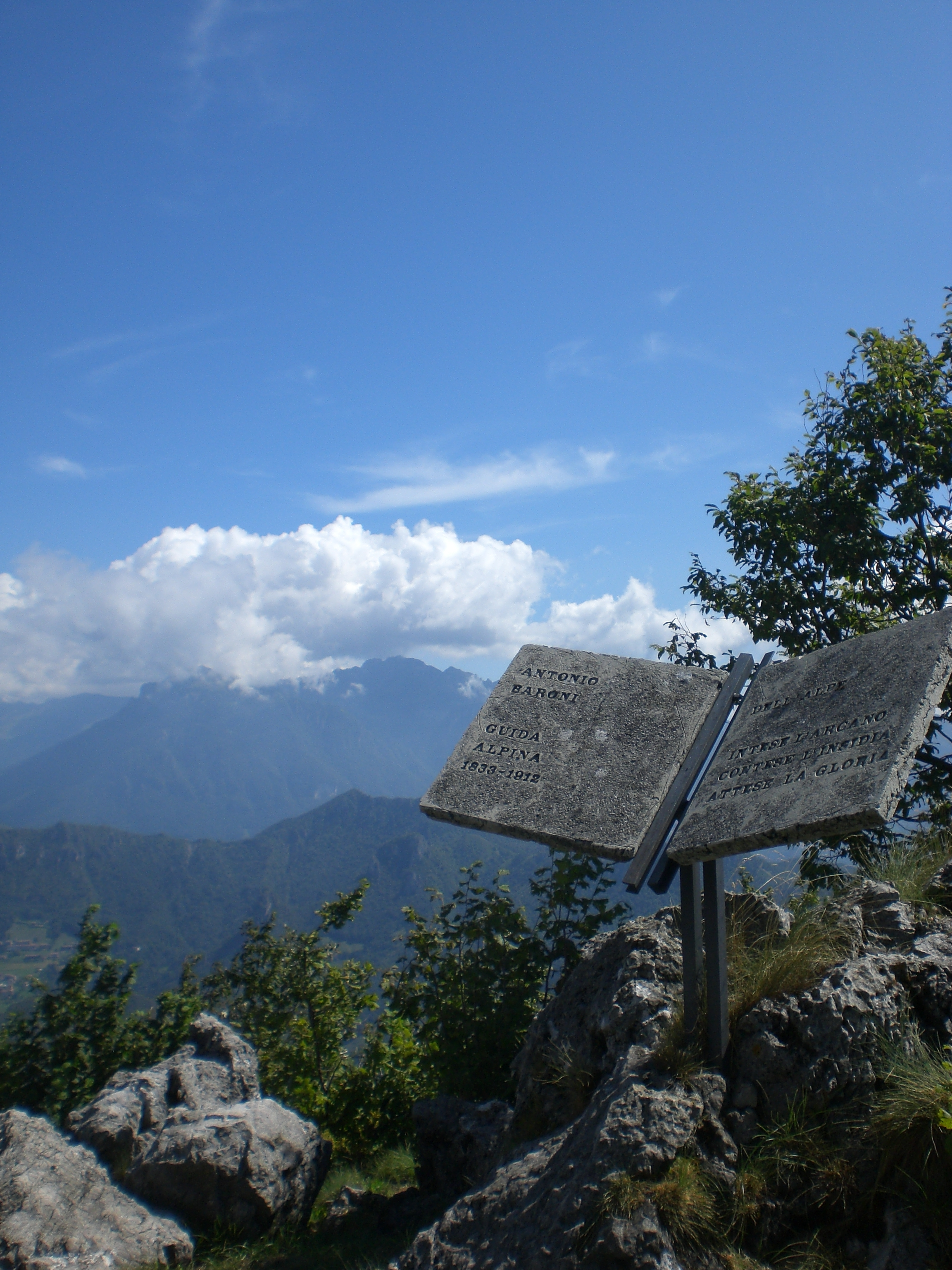 Monumento dedicato ad Antonio Baroni sulla vetta del Monte Zucco - foto realizzata da Daniela Bonzi